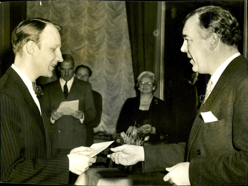 Foto infört i Svenska Dagbladet 1956-02-24 sid 3. Bildtext 1956: "Fil. lic. Knut Ahnlund, som skall studera de amerikanska undervisningsformerna i litteraturvetenskap, får sitt stipendiebrev av prins Bertilprins Bertil."